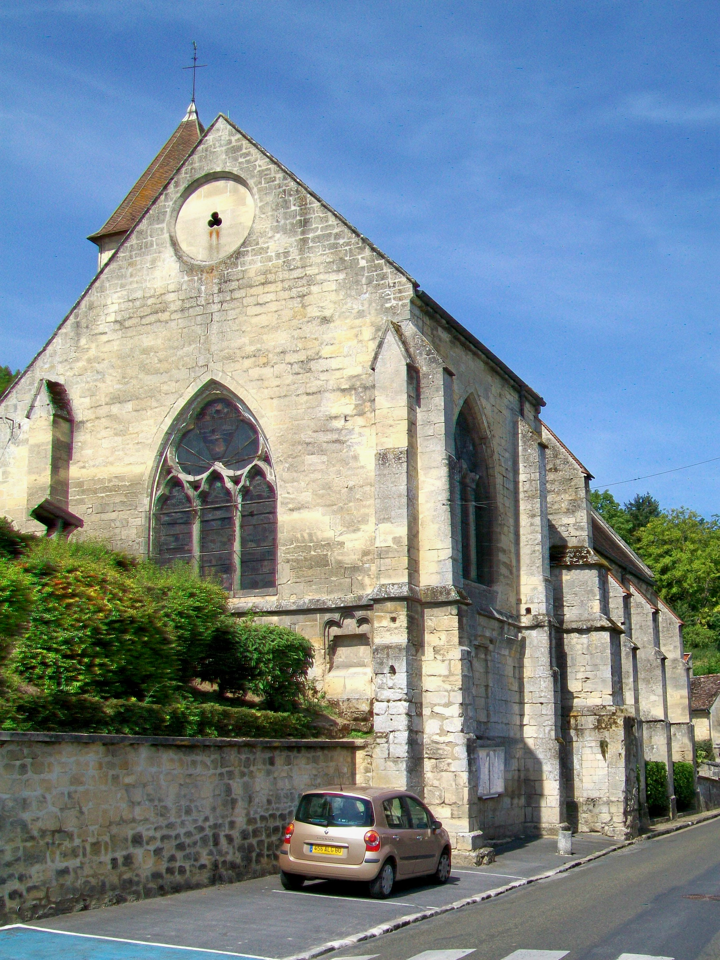 L'église Saint-Martin depuis la rue Henri-Heurteur, en bas ; c'est l'une des deux ceignant le bâtiment.